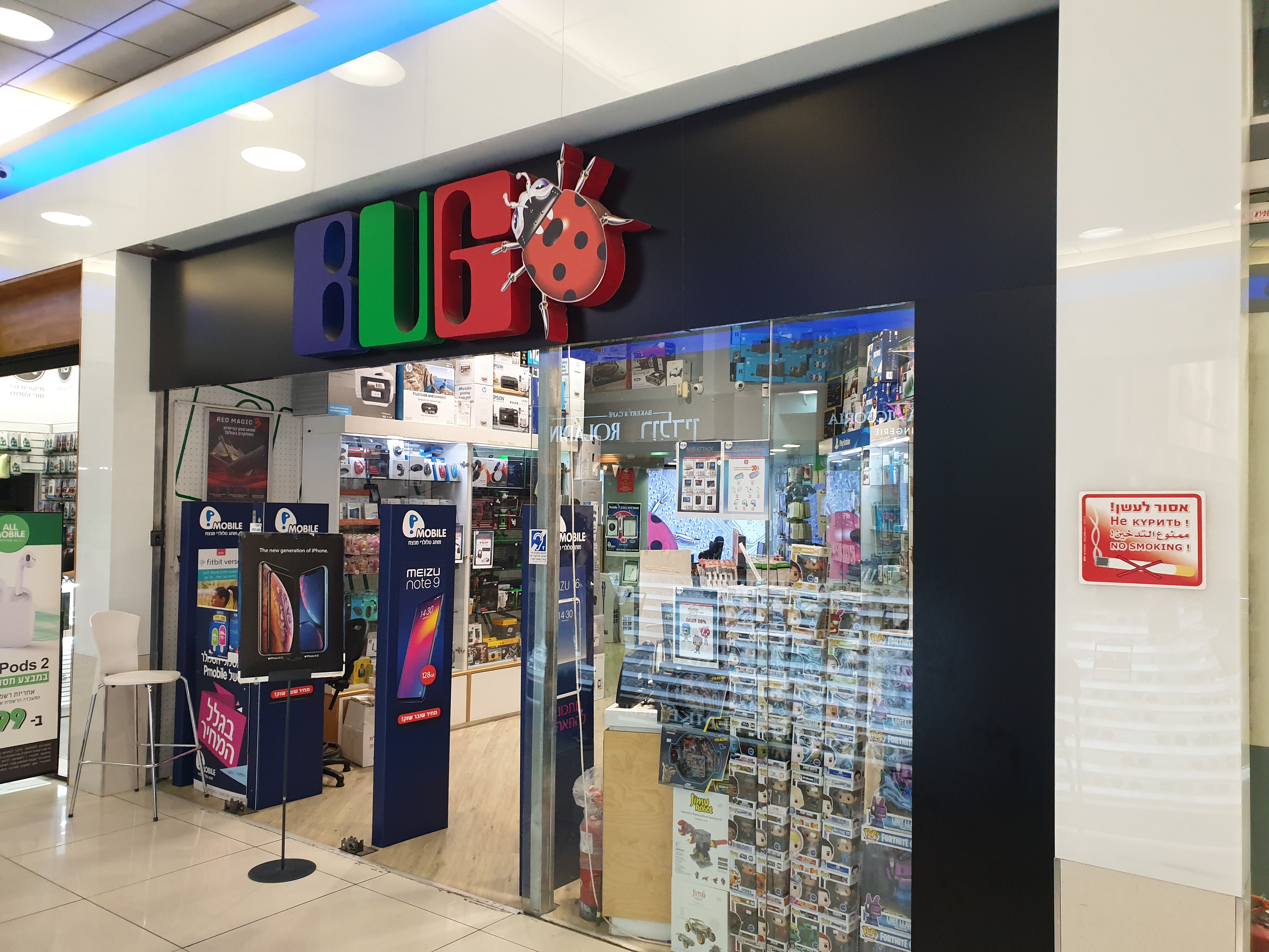 באג נתניה קניון השרון